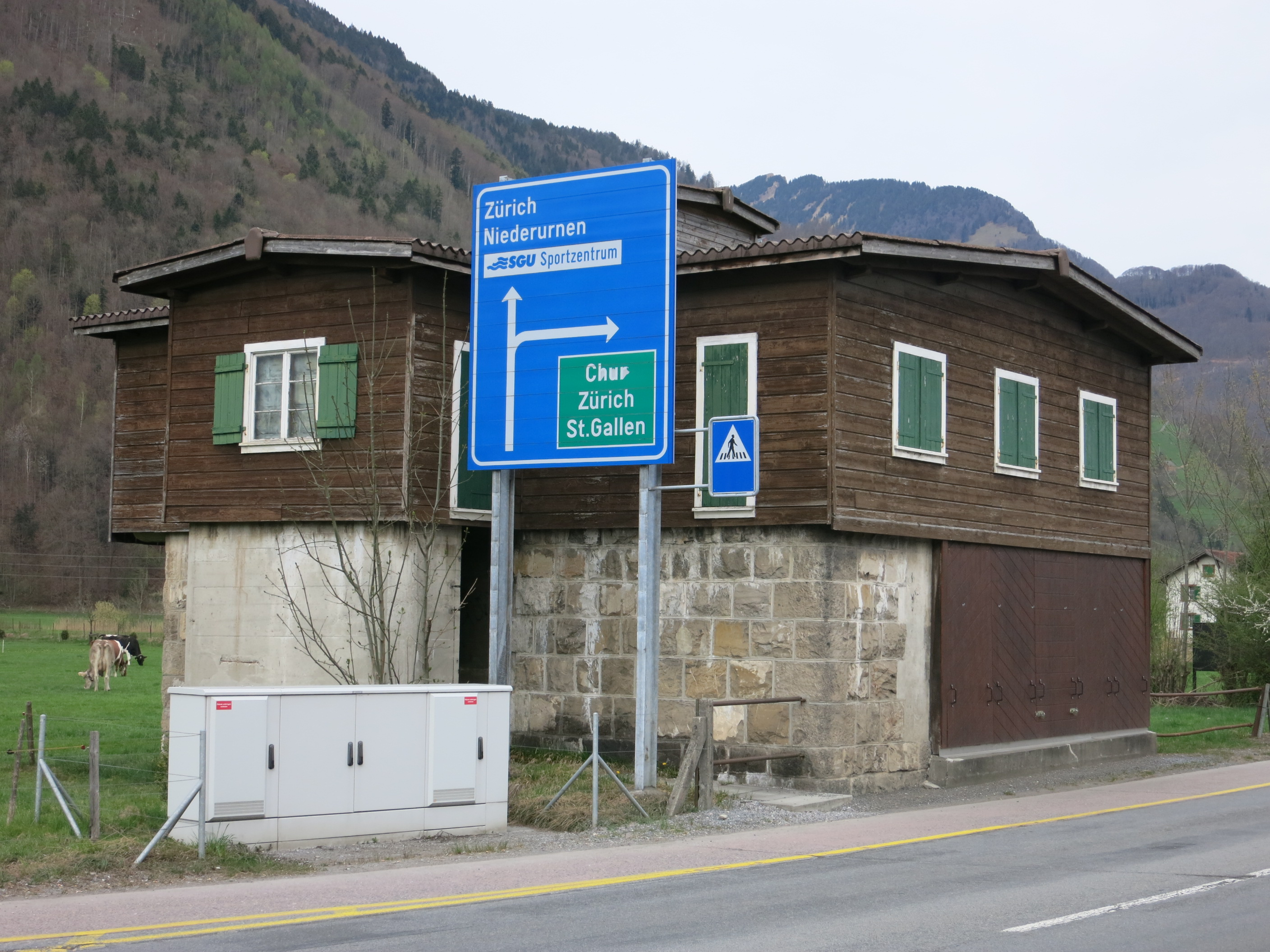 Sperrstelle Näfels GL, Schweiz